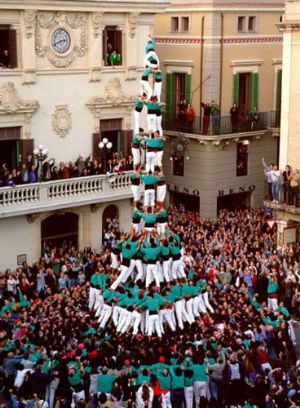 1er 3 de 10 amb folre i manilles de la història